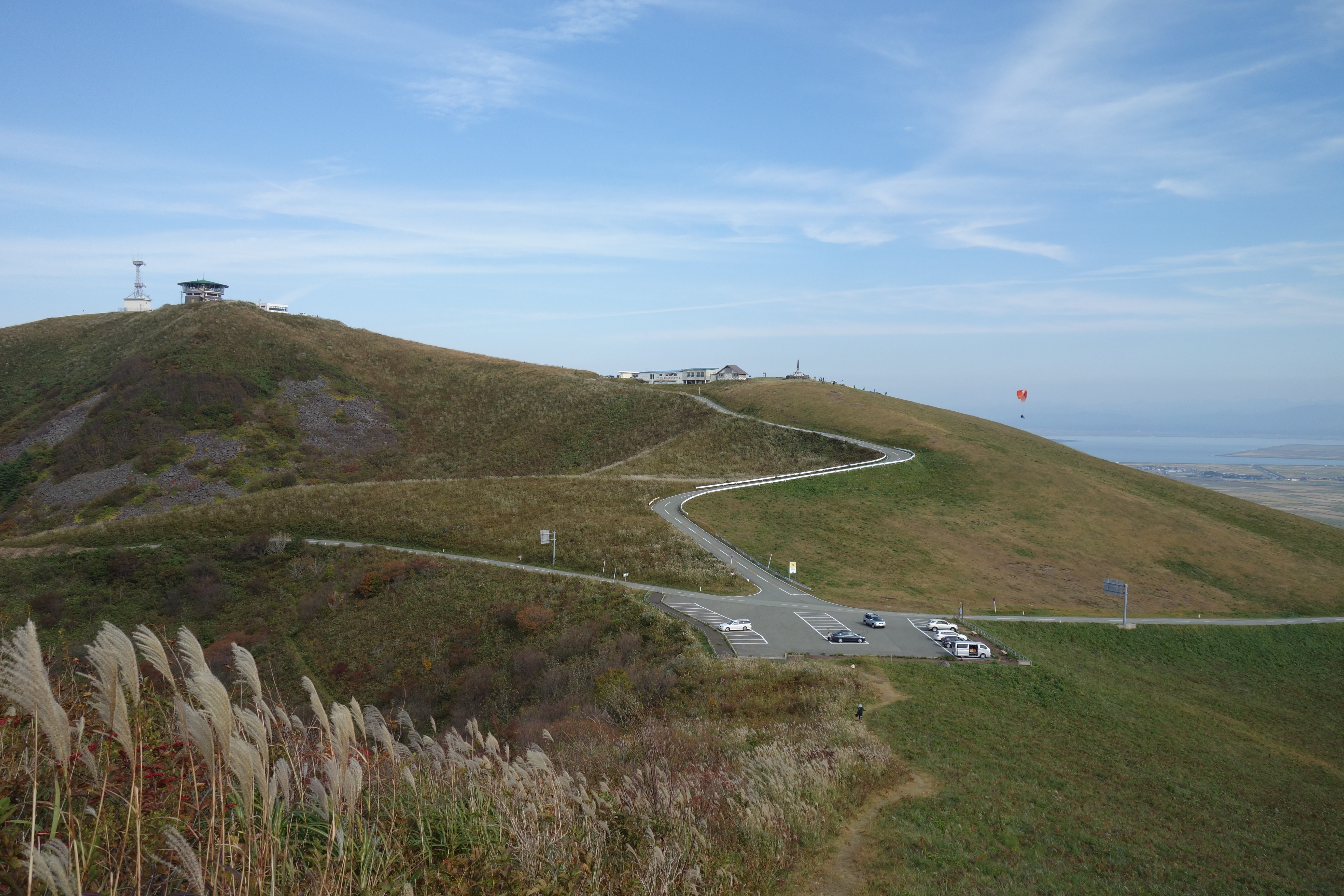 姫ヶ岳より望む寒風山 山頂への道路のカーブし、内部が凹んでいる部分に小さな噴火口がある